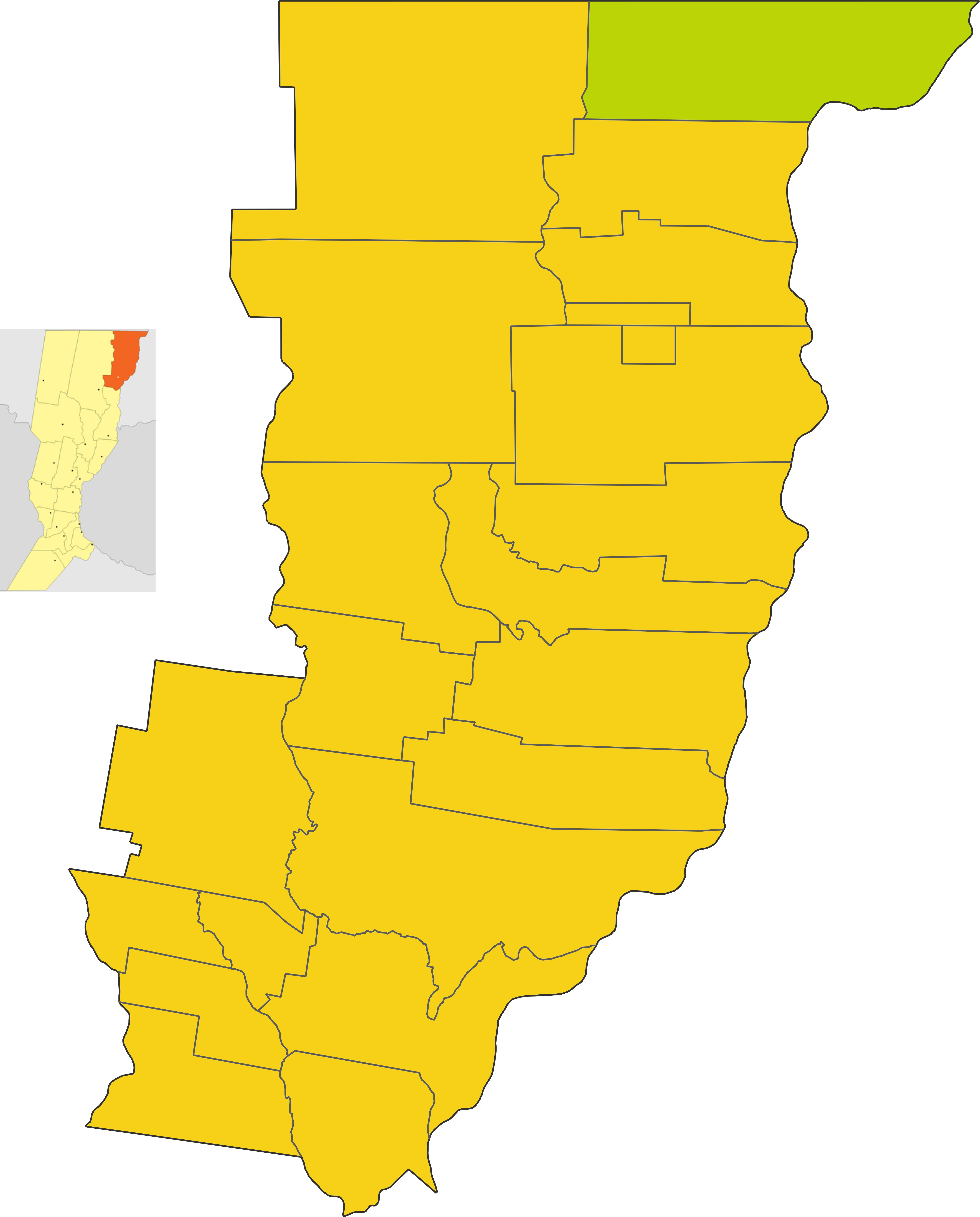 Map of the comuna de Florencia in General Obligado department, Santa Fe province, Argentina